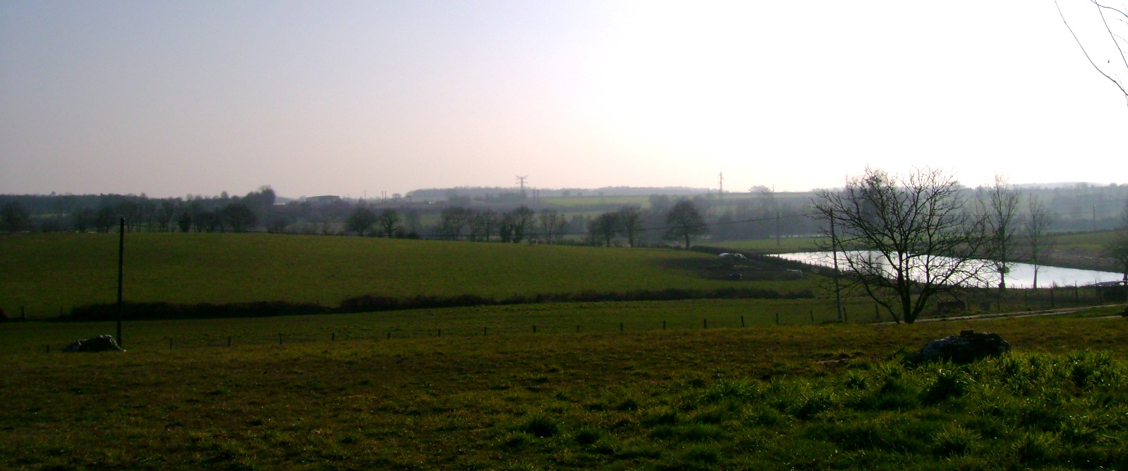 Paysage des environs de Candé, 49, France (photo prise sur la commune de Vritz, 44)